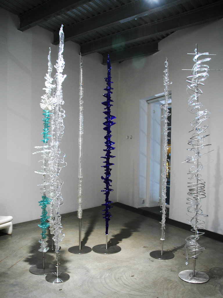 René Roubíček, Montrealské sloupy, 1966-2010